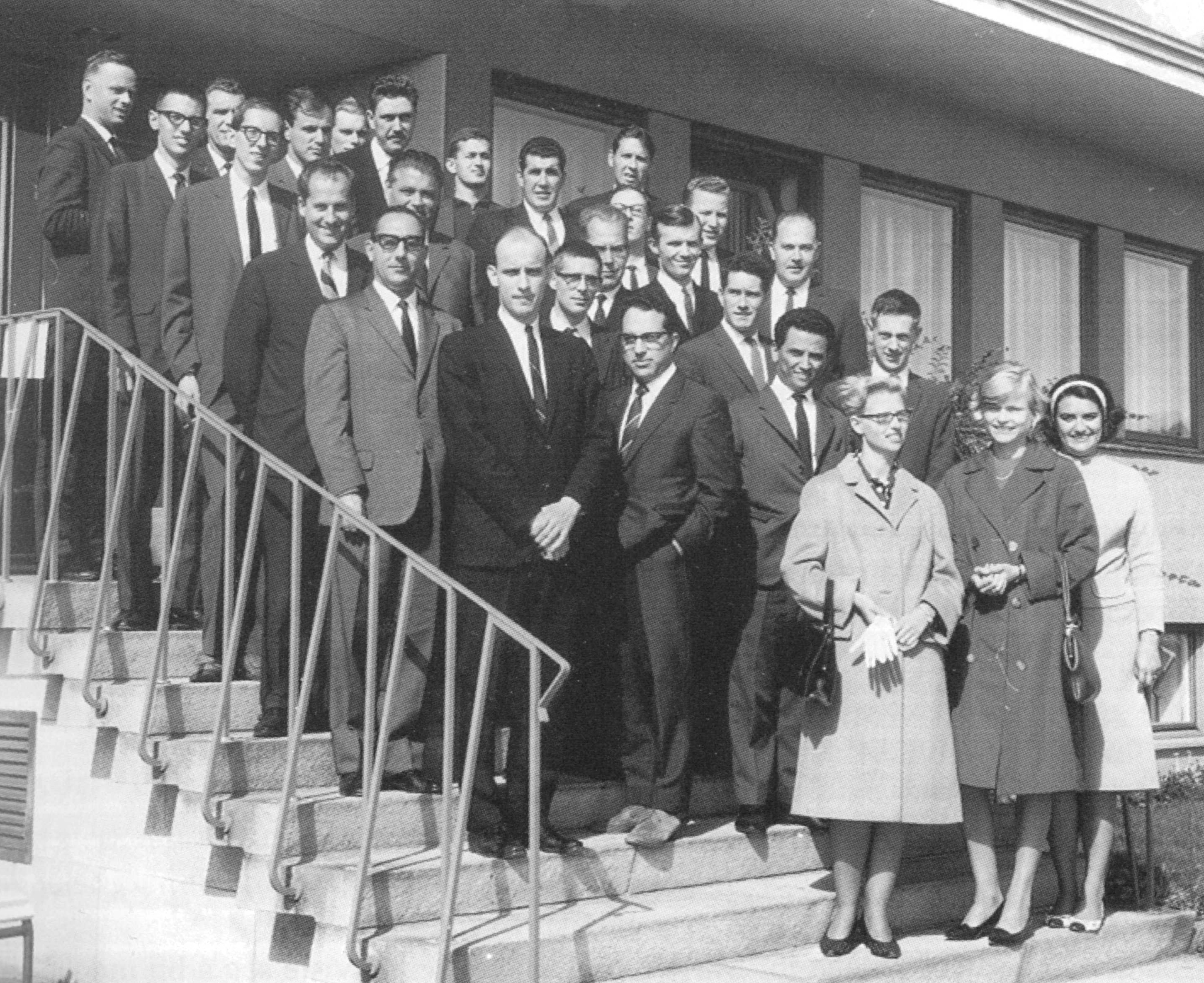 Besøk til Norsk Regnesentrals UNIVAC 1107 fra USA og flere europeiske land, sommeren 1964. Første fra venstre på øverste rekke er Kristen Nygaard, nummer to fra høyre på nederste rekke er Drude Berntsen